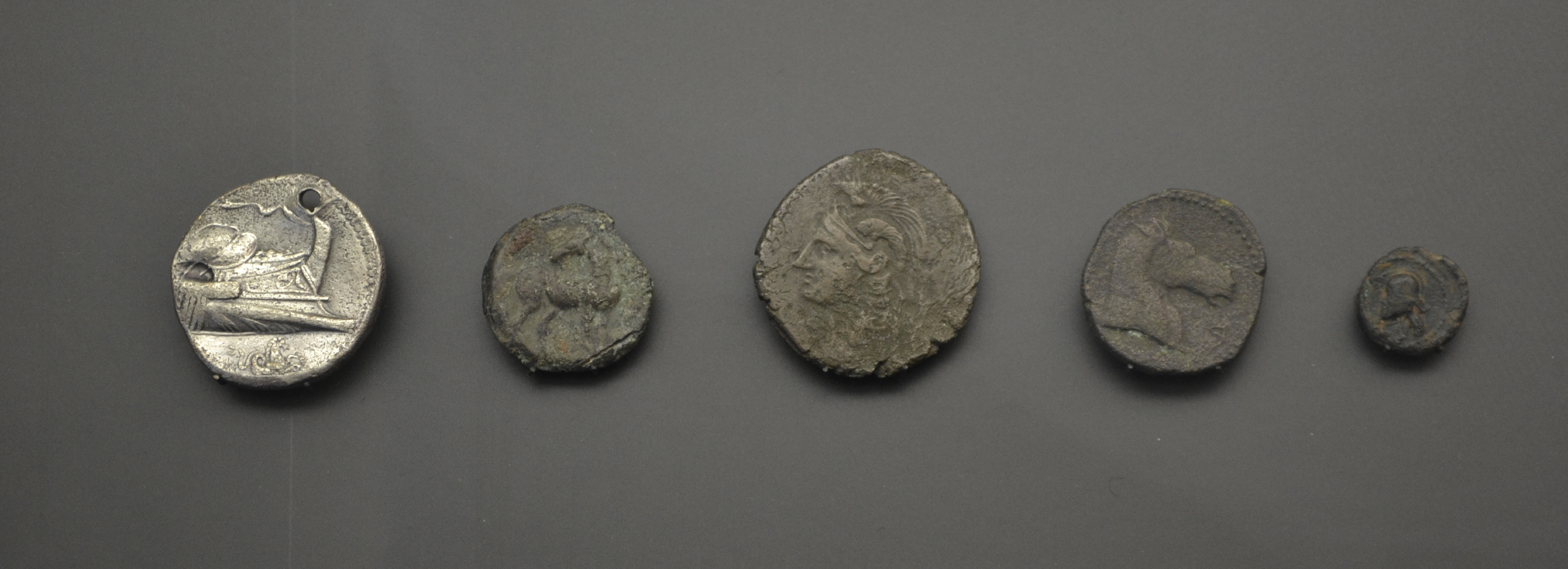 Monedas hispano-cartaginesas. Dishekel, unidad y divisores. Museo de Prehistoria de Valencia.